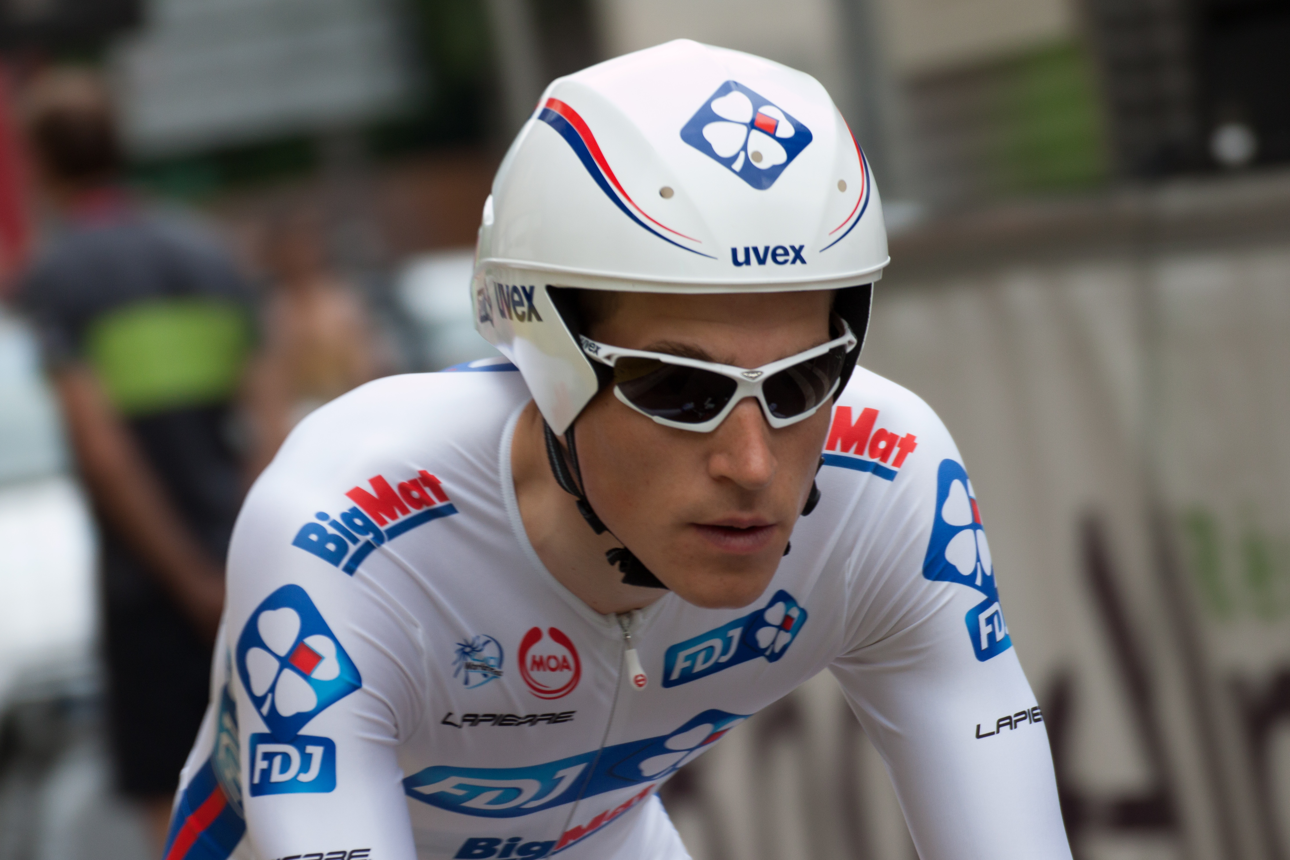 Arnold Jeannesson au Prologue du Critérium du Dauphiné 2012